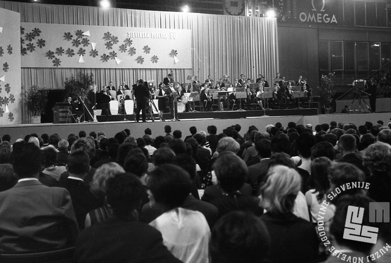 Festival Slovenska popevka v Tivoliju.